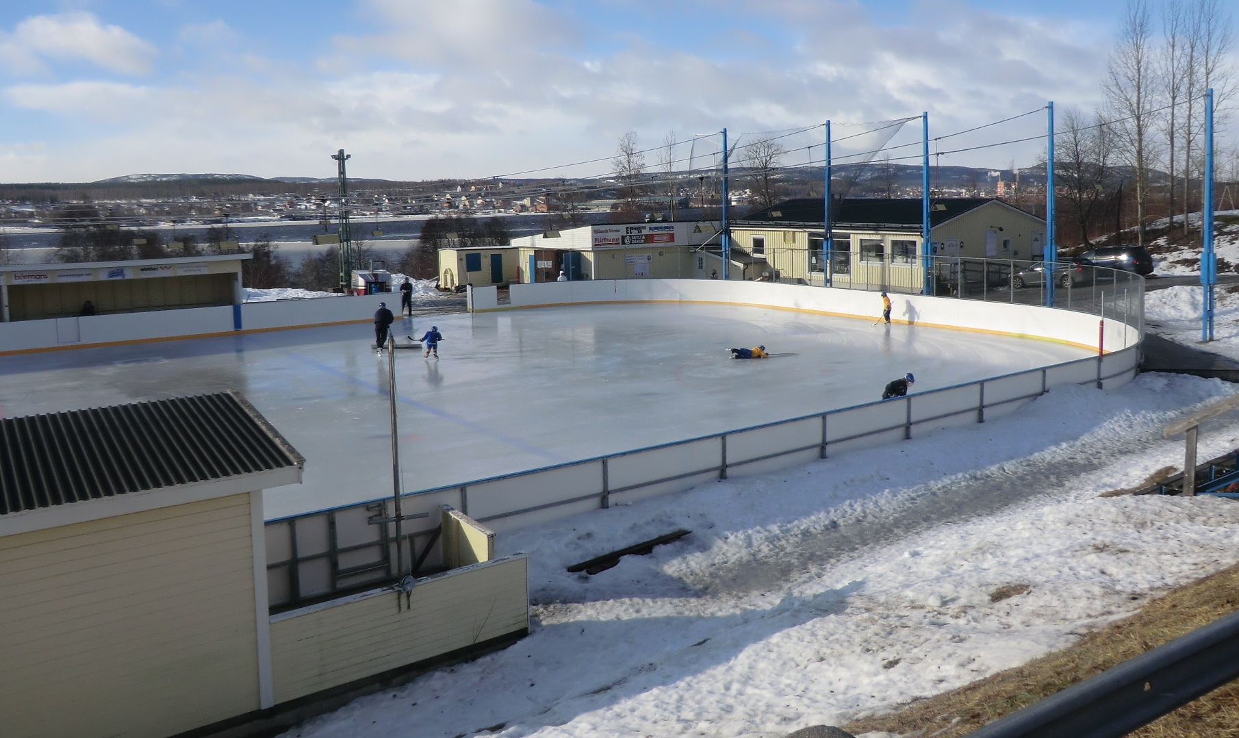 Järveds IFs hemmaplan, Getinghov.